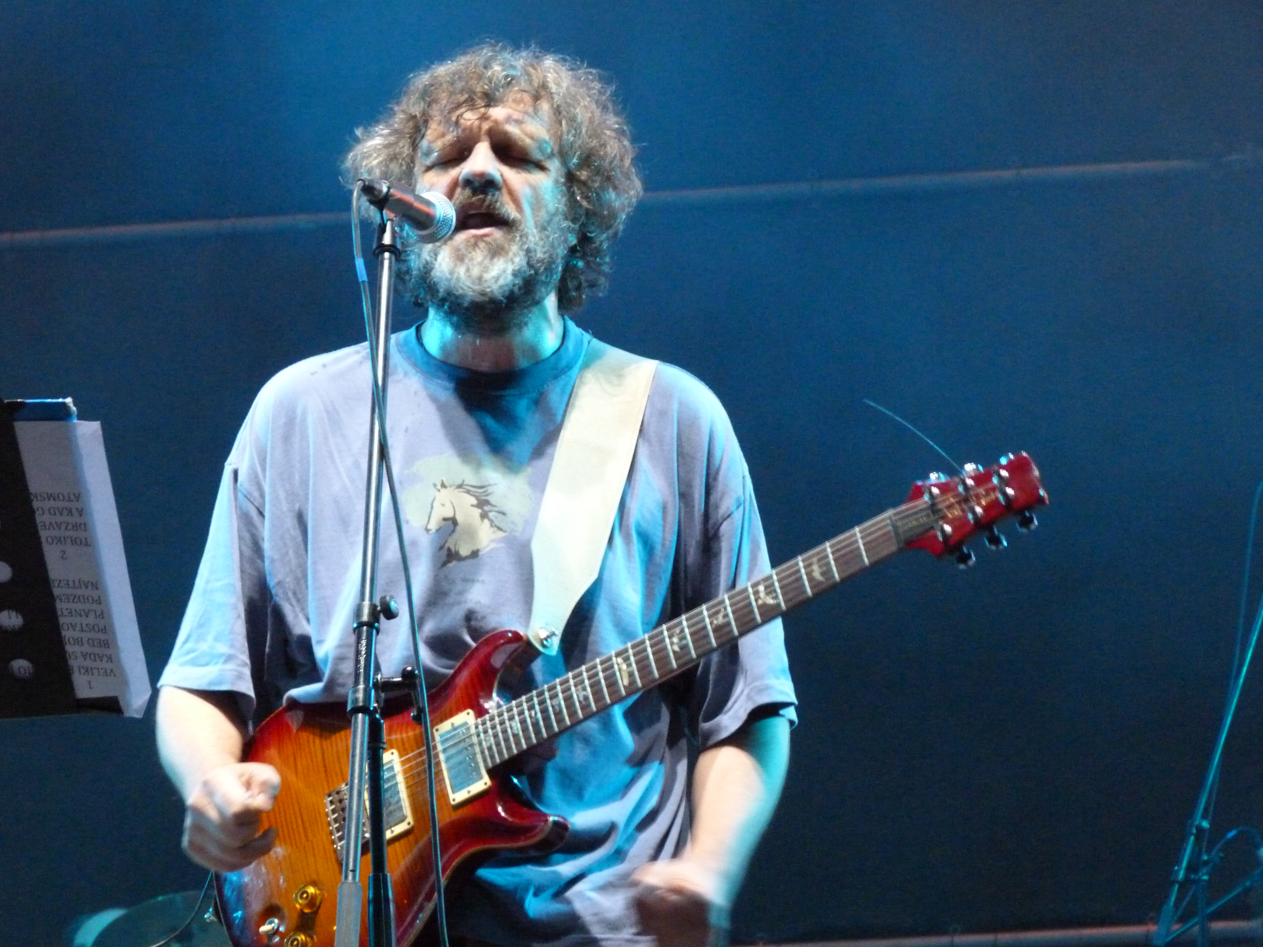 A felvétel 2014. május elsején készült Budapesten. Budapest Park. Emir Kusturica és a No Smoking Orchestra. ©© Derzsi Elekes Andor, Budapest, 2014, A kép és filmfelvételek egészben, vagy részletekben másolását, bármilyen úton történő sokszorosítását és felhasználását a szerző ellenérték nélkül, jogutódjaira is kihatóan megengedi. Az engedély kiterjed a kereskedelmi célú hasznosításra is. Kéri azonban nevének feltüntetését a felhasználás során. A Metapolisz sorozat valamennyi képe és filmje Creative Commons alatti valamint kereskedelmi - for profit - célra is felhasználható. Ajánlott hivatkozás: Derzsi Elekes Andor: Metapolisz DVD line